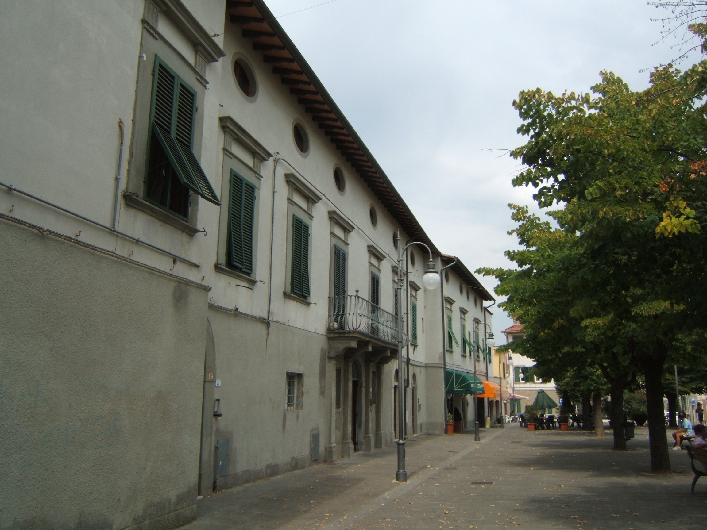 Façade de la Villa Medicea di Collesalvetti